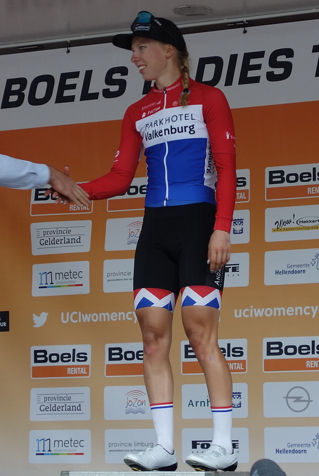 Lorena Wiebes won de eerste etappe in Weert en kreeg de witte jongerentrui in de Boels Ladies Tour 2019